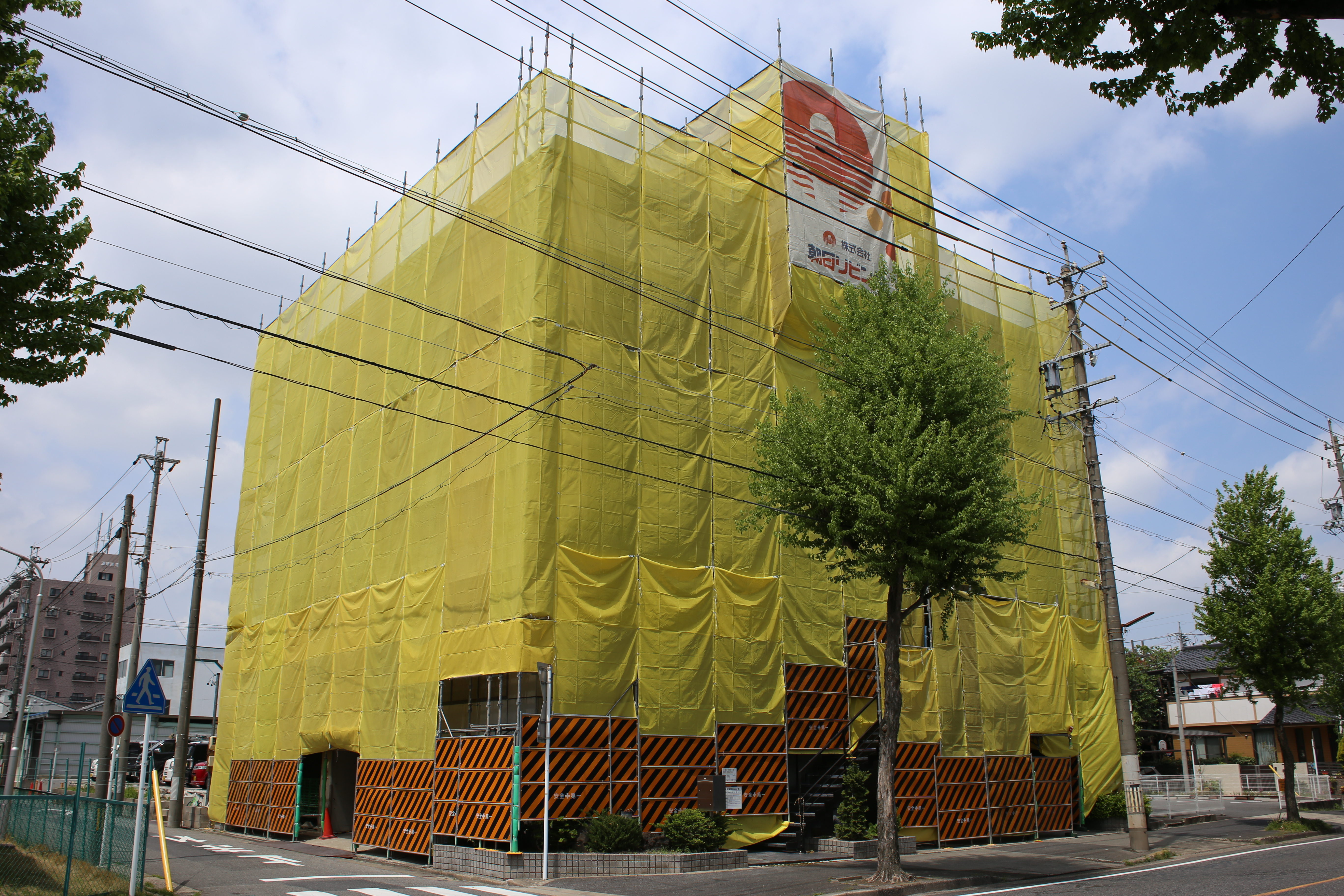 名古屋市南区豊田三丁目の旧ロイヤル工業本社ビルを東側公道南側より撮影